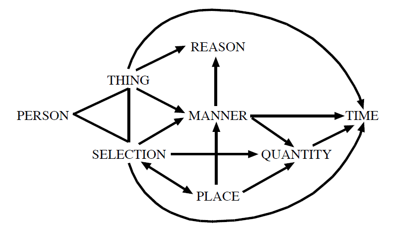 Схема возможных направлений деривации семантических типов вопросительных местоимений в языках мира